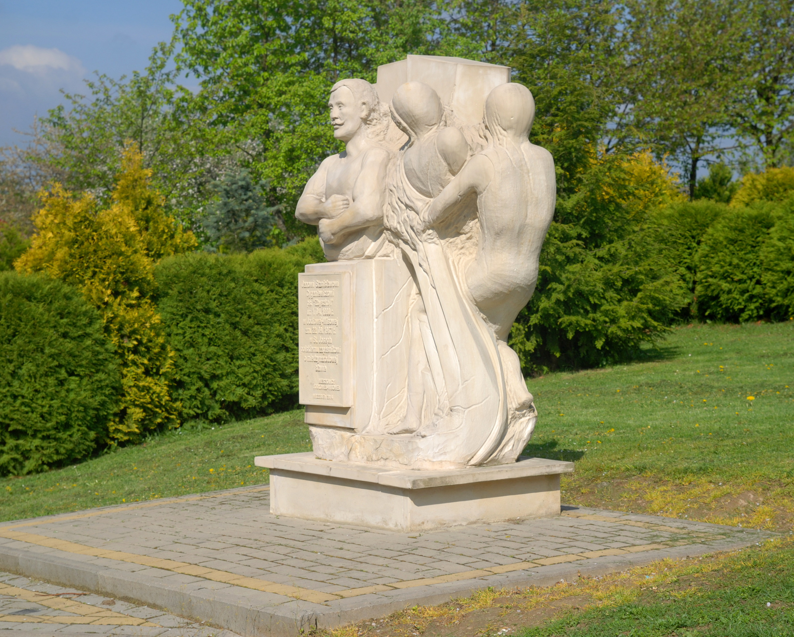 wieś Jodłowa